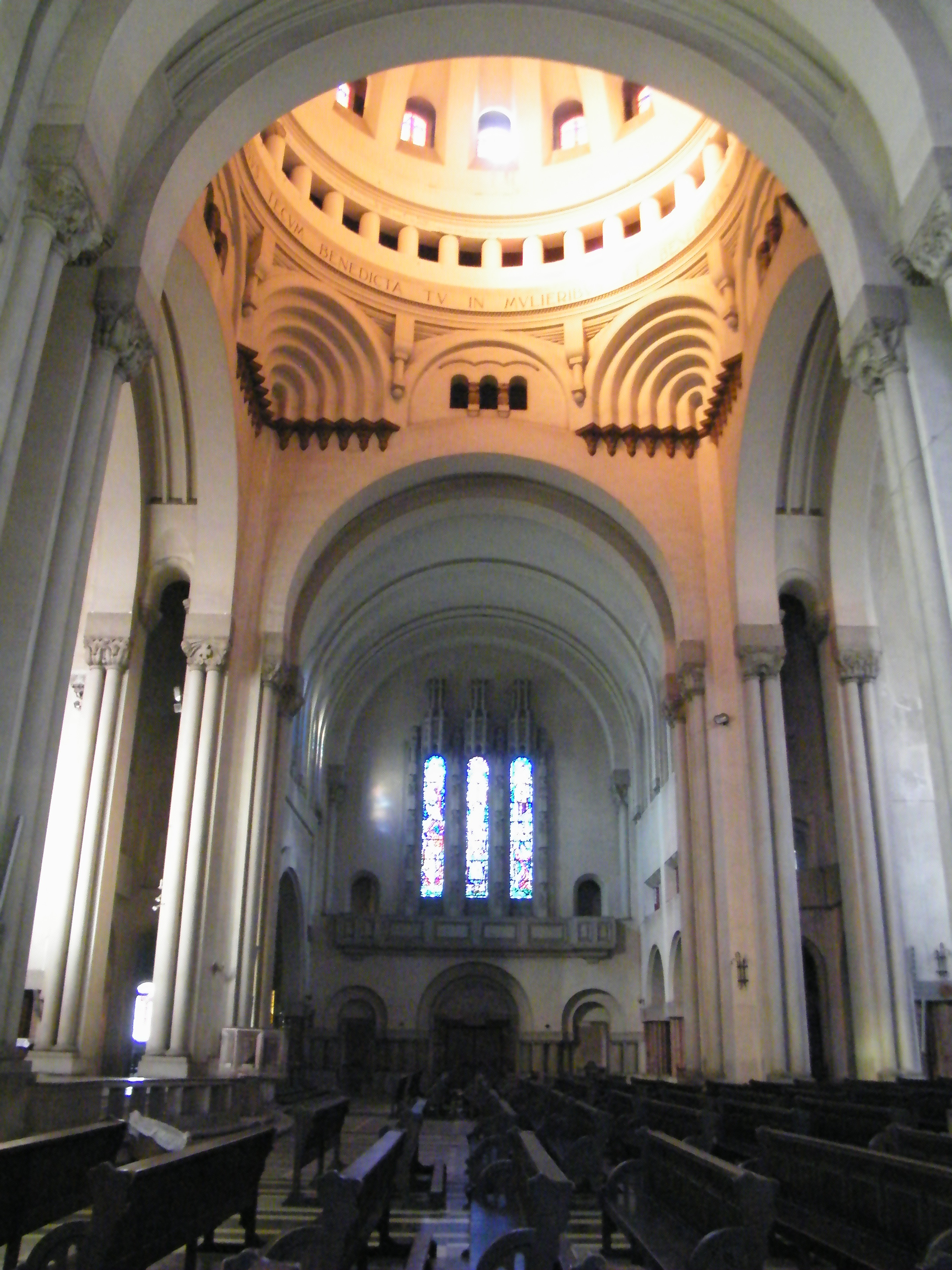 Imágenes Santuario Lourdes(Chile), Basílica.